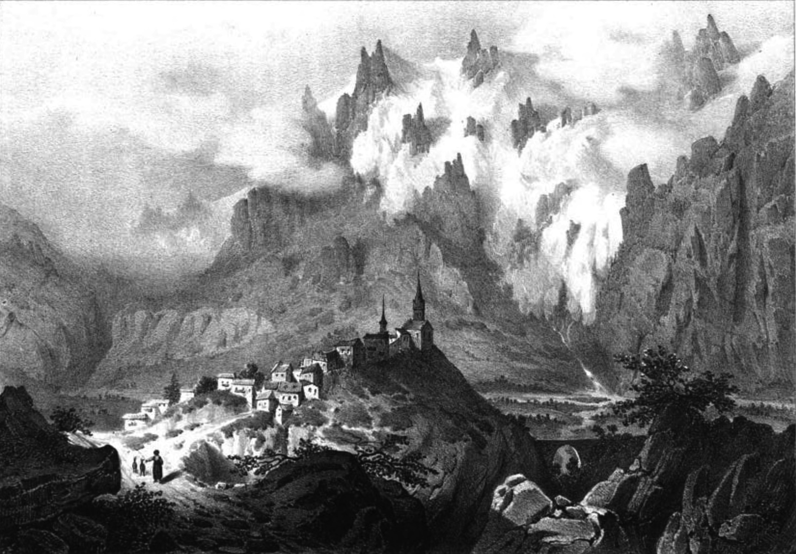 Album du Dauphiné - tome III, litographie de